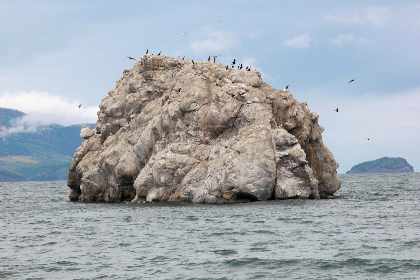 Остров Камешек, Баргузинский район This image is related to the protected area of Russia number 0310008